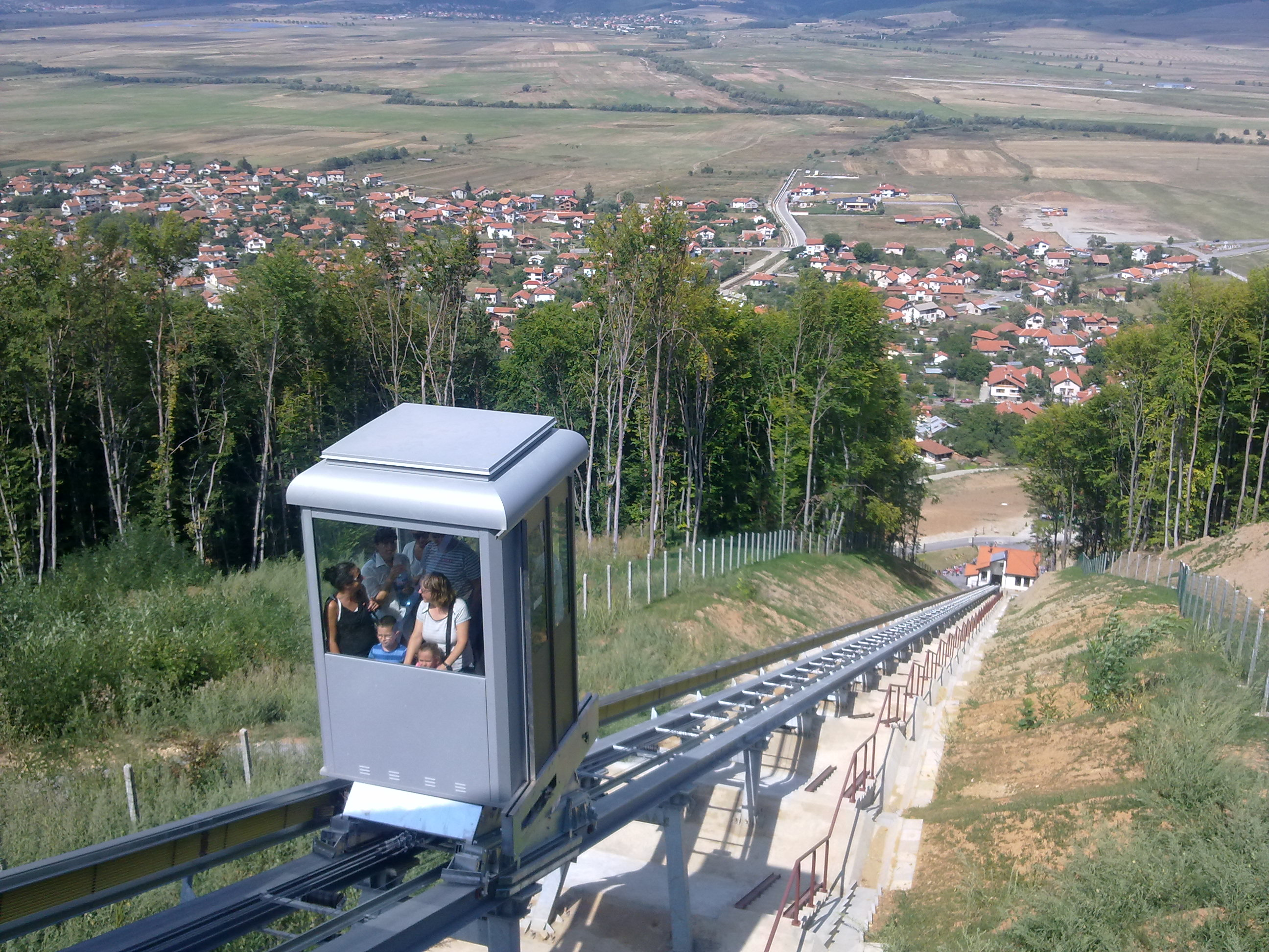 Фуникулер на хълма "Св. Спас", с. Белчин, Софийска област